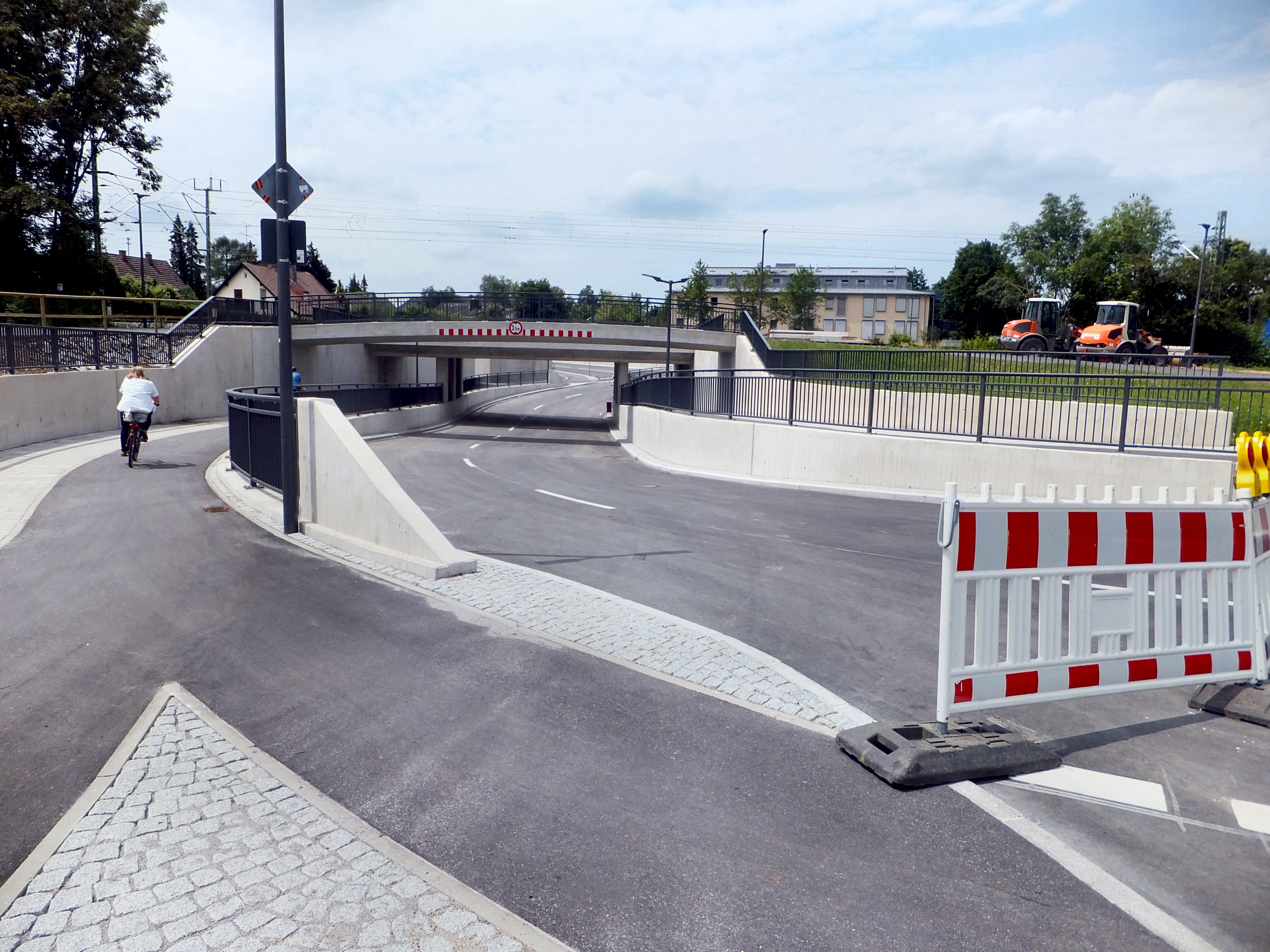 Neue Bahnunterführung Unterschleißheim, 14.6.2015